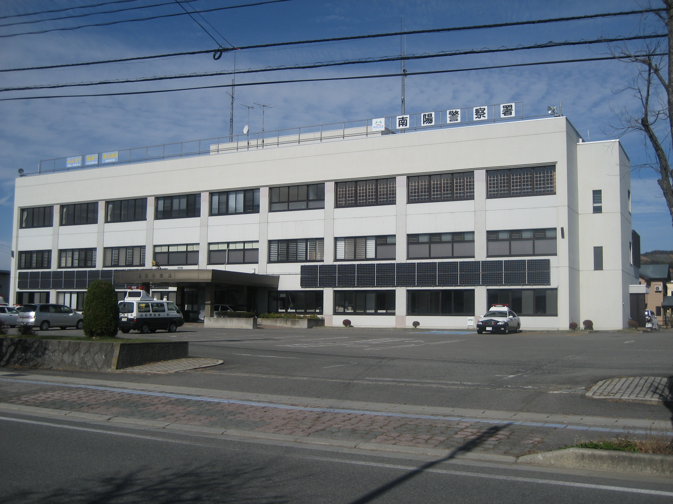 山形県南陽警察署庁舎